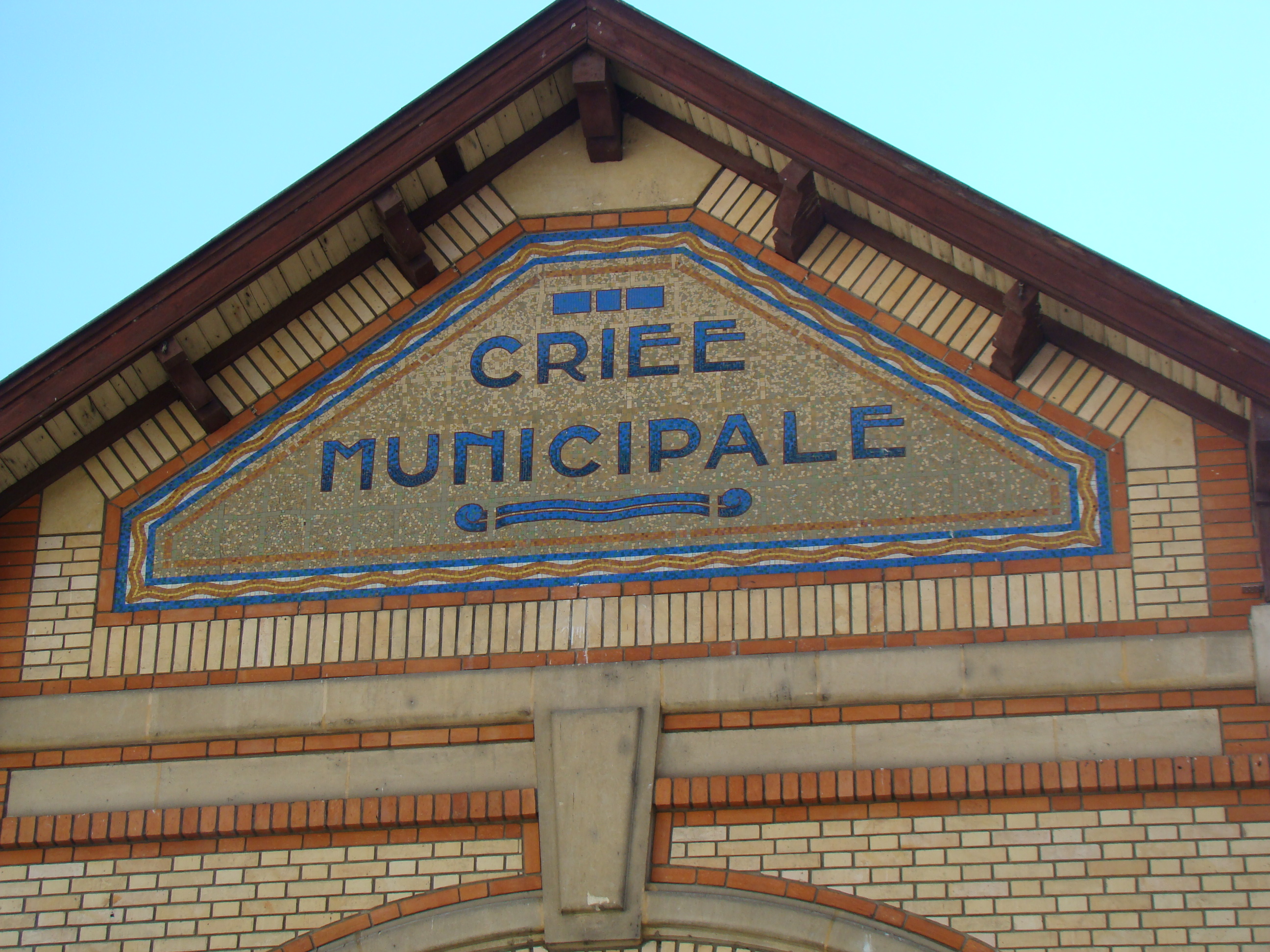 Mosaïque d'Isidore Odorico (fils) aux Halles centrales à Rennes.